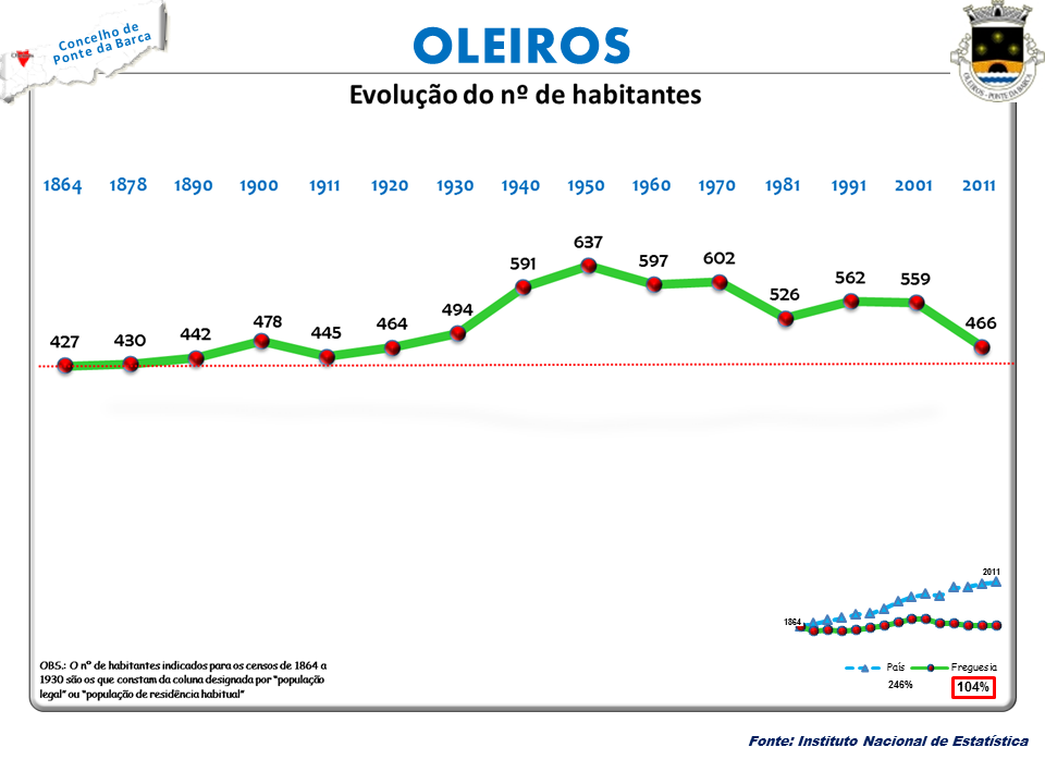 Censos 1864/2011